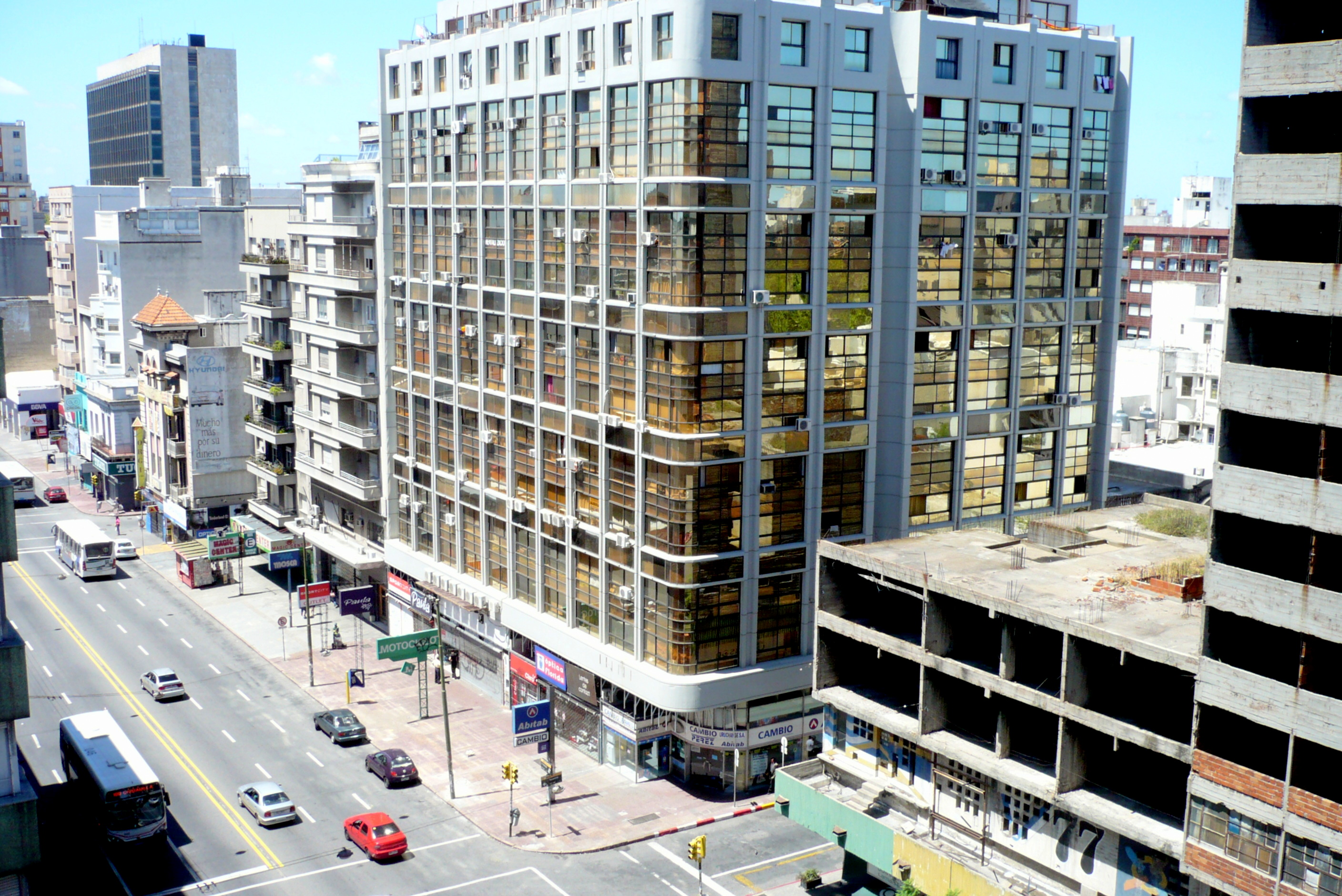 Calle Avenida 18 de Julio esquina Tacuarembo